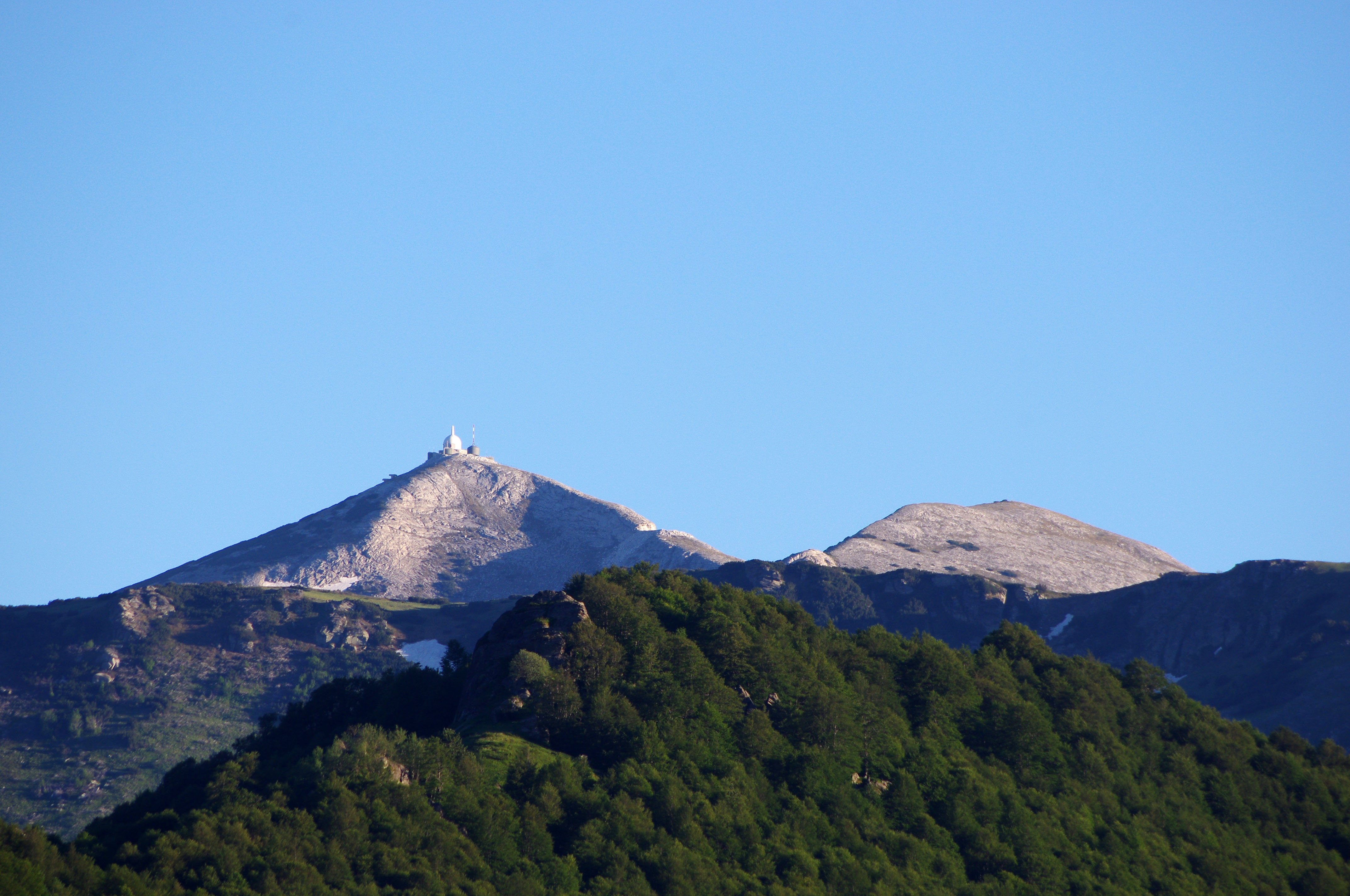 Солунска Глава (2,540m), погледната од планинарскиот Дом „Караџица“